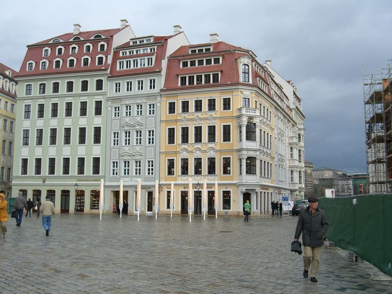 Dresden - Neumarkt Quartier II: An der Frauenkirche 13 und 14, Rampische Straße 1